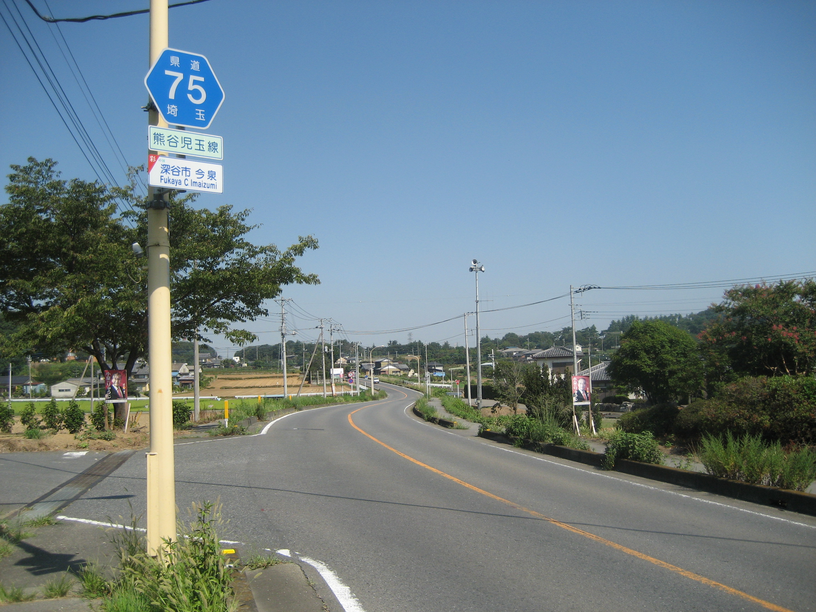 埼玉県道75号線深谷市今泉付近